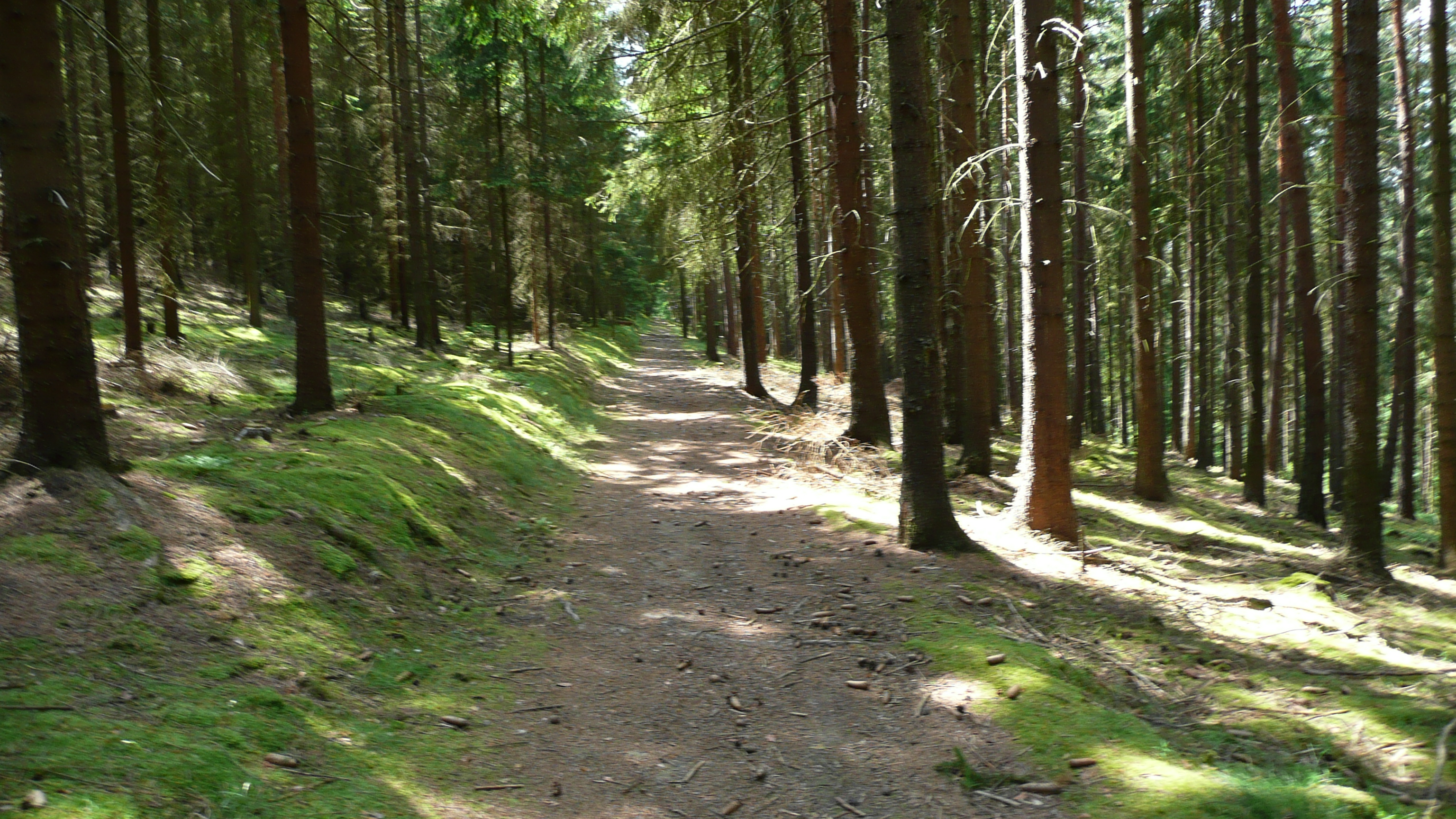 Lesní cesta nedaleko mšsta Kladruby.